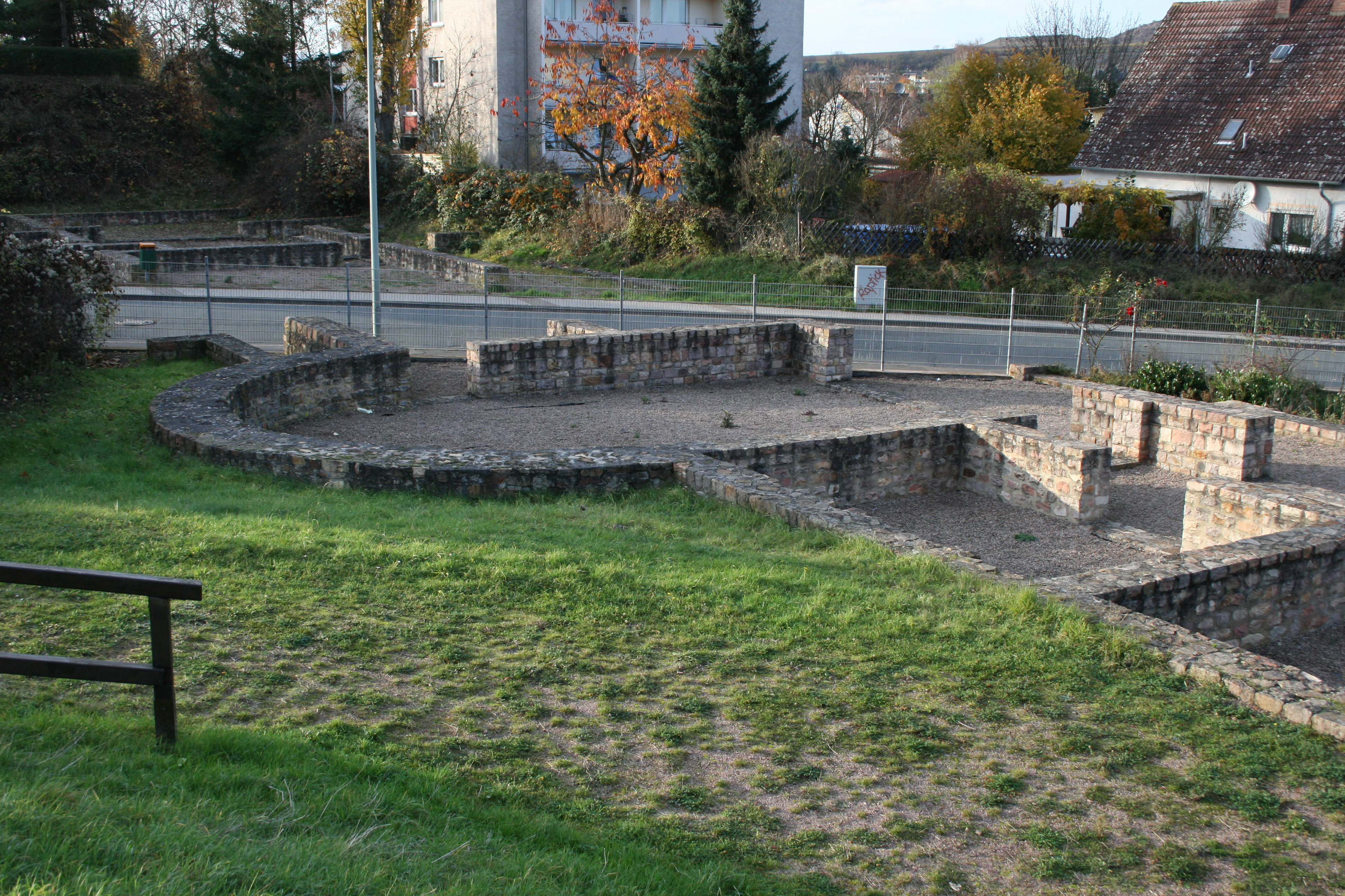 Außenanlage der Römerhalle. In der Bildmitte Apsis der römischen Villa.